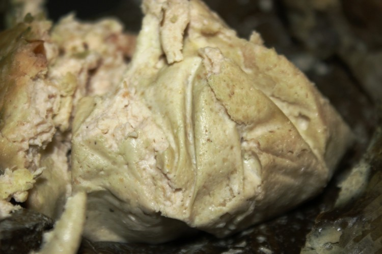 gateau de graines de courges (recette du Cameroun) This is an image of food from Cameroon